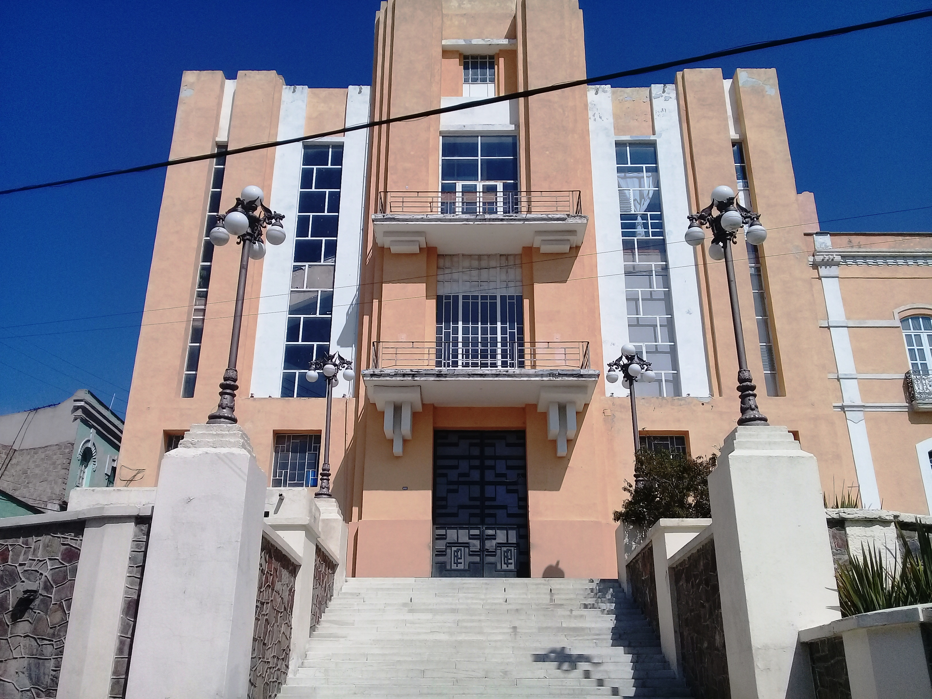 Edificio central UAEH, Pachuca.